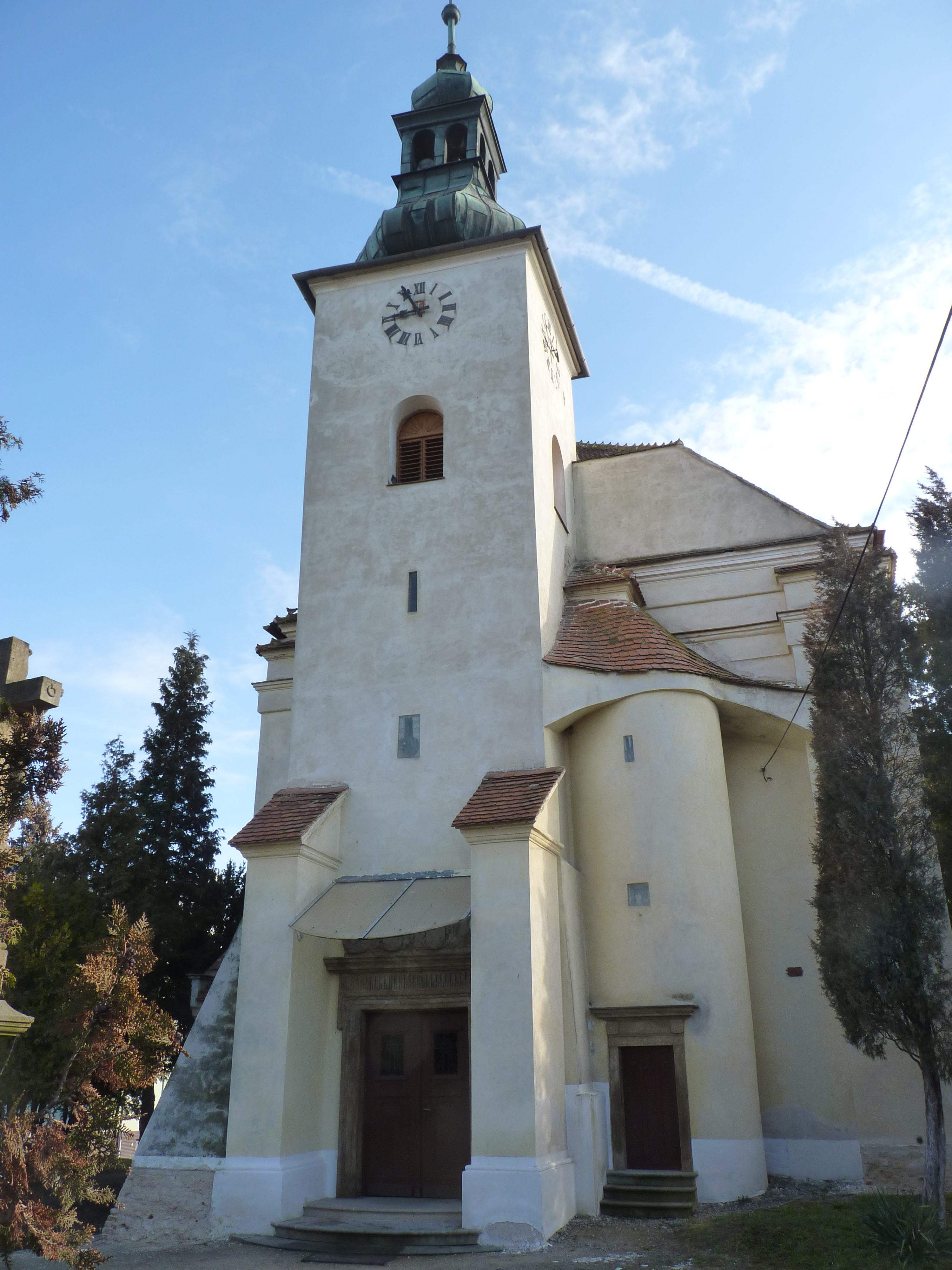 Kostel sv. Jana Křtitele (Vlasatice), Vlasatice